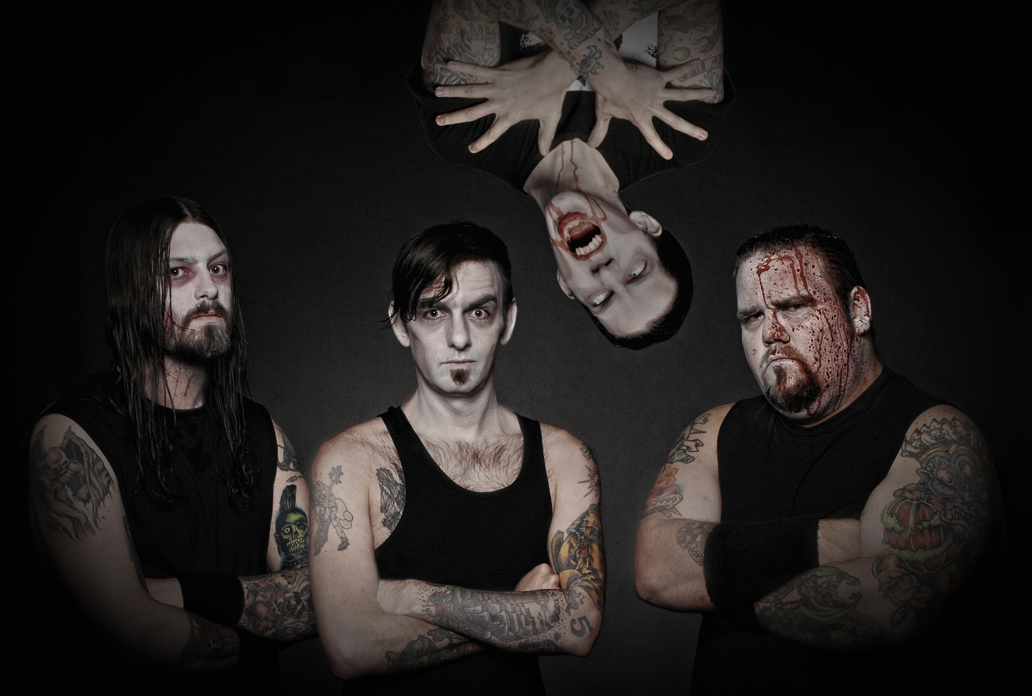 Blitzkid (Last Bandphoto 2012 (3))